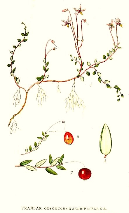 Vaccinium oxycoccos L., syn. Oxycoccus quadripetalus Schinz & Thell. Original Description Tranbär, Oxycoccus quadripetalus Gill.